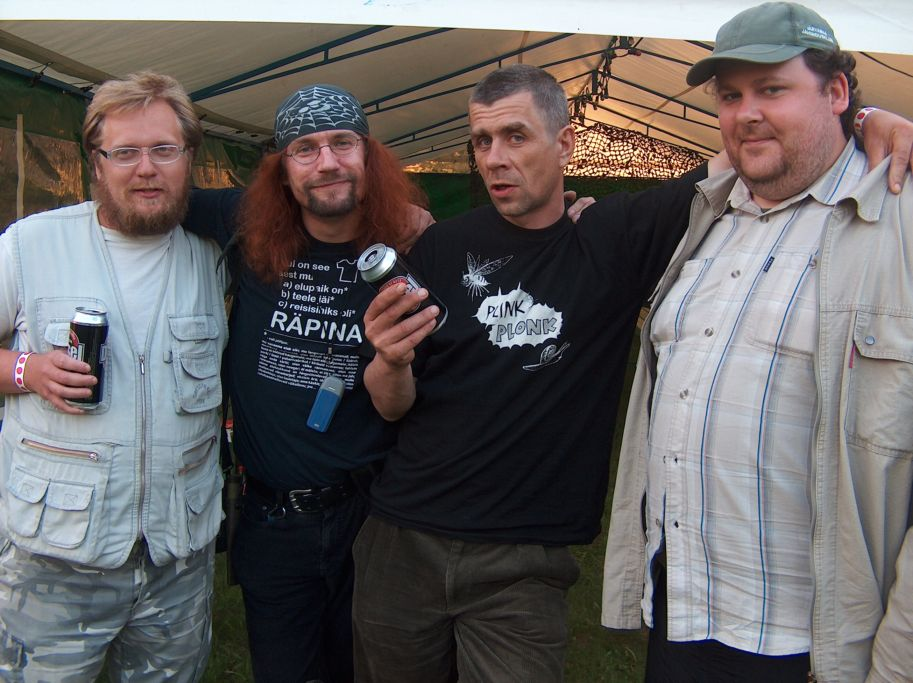 Naklased Contra, Aapo Ilves, Olavi Ruitlane ja Jaan Pehk 25. mail 2007 Koeru holaööl